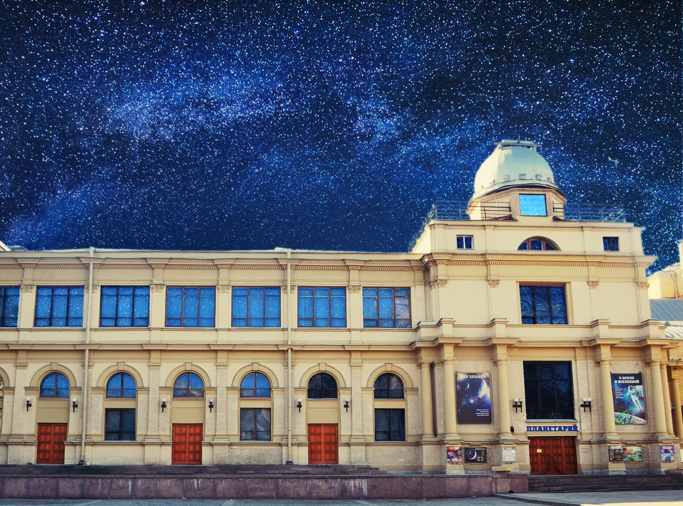 Петербургский Планетария